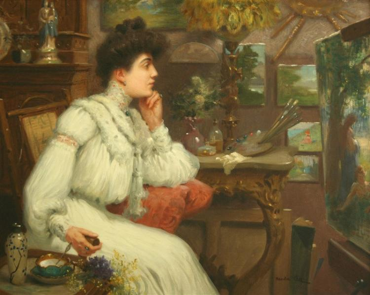 L'Élegante dans l'Atelier